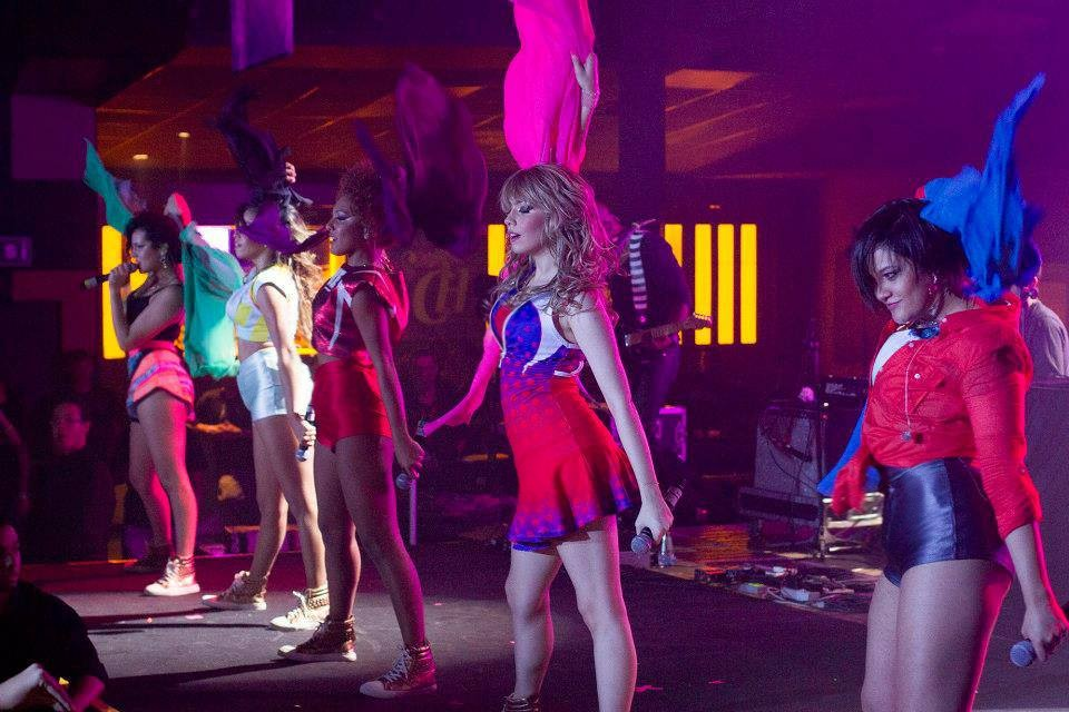 Grupo Girls se apresenta no festival No Capricho, em 2013.